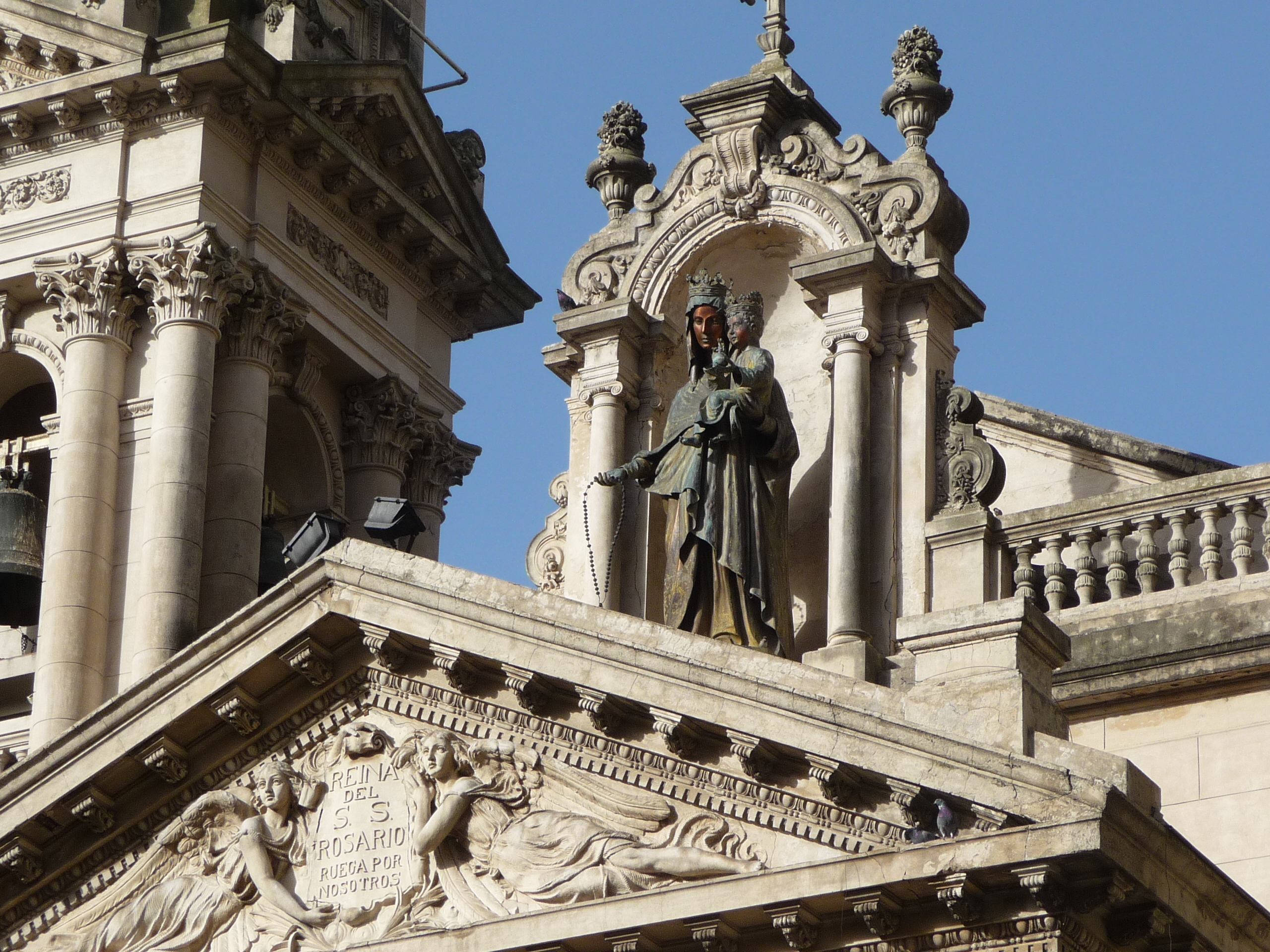 Centro histórico de Rosario - Detalle de la fachada de la Catedral de Rosario